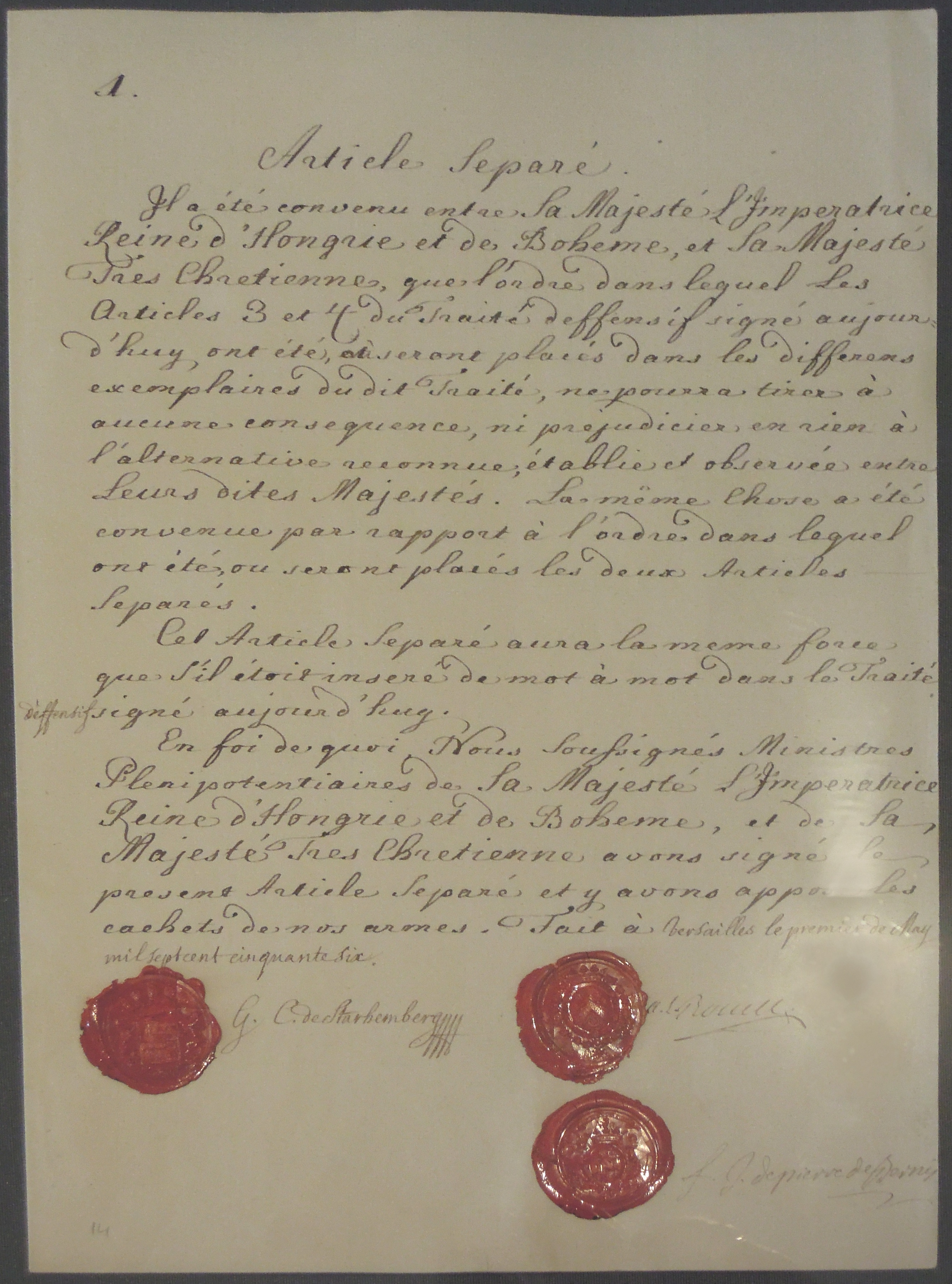 Unterhändlerurkunde / Unterhändlerinstrument des ersten Seperatartikels (= am gleichen Tag ausgestellte Nebenurkunde) des Vertrags von Versailles 1756 Größe: 32,0x20,5 cm Österreichisches Staatsarchiv (Wien), Abteilung Haus-, Hof- und Staatsarchiv, Allgemeine Urkundenreihe 1756 V 1.